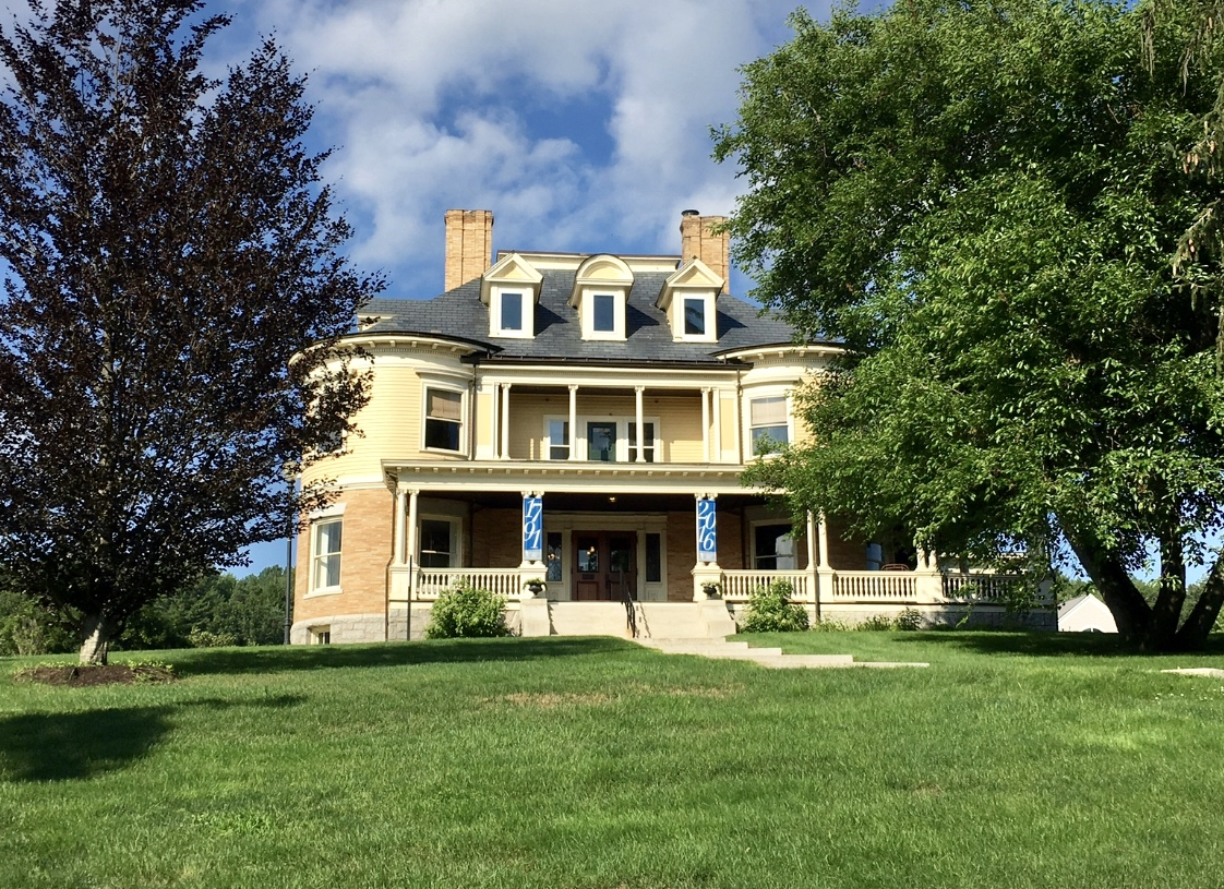 Burleigh-Davidson Building